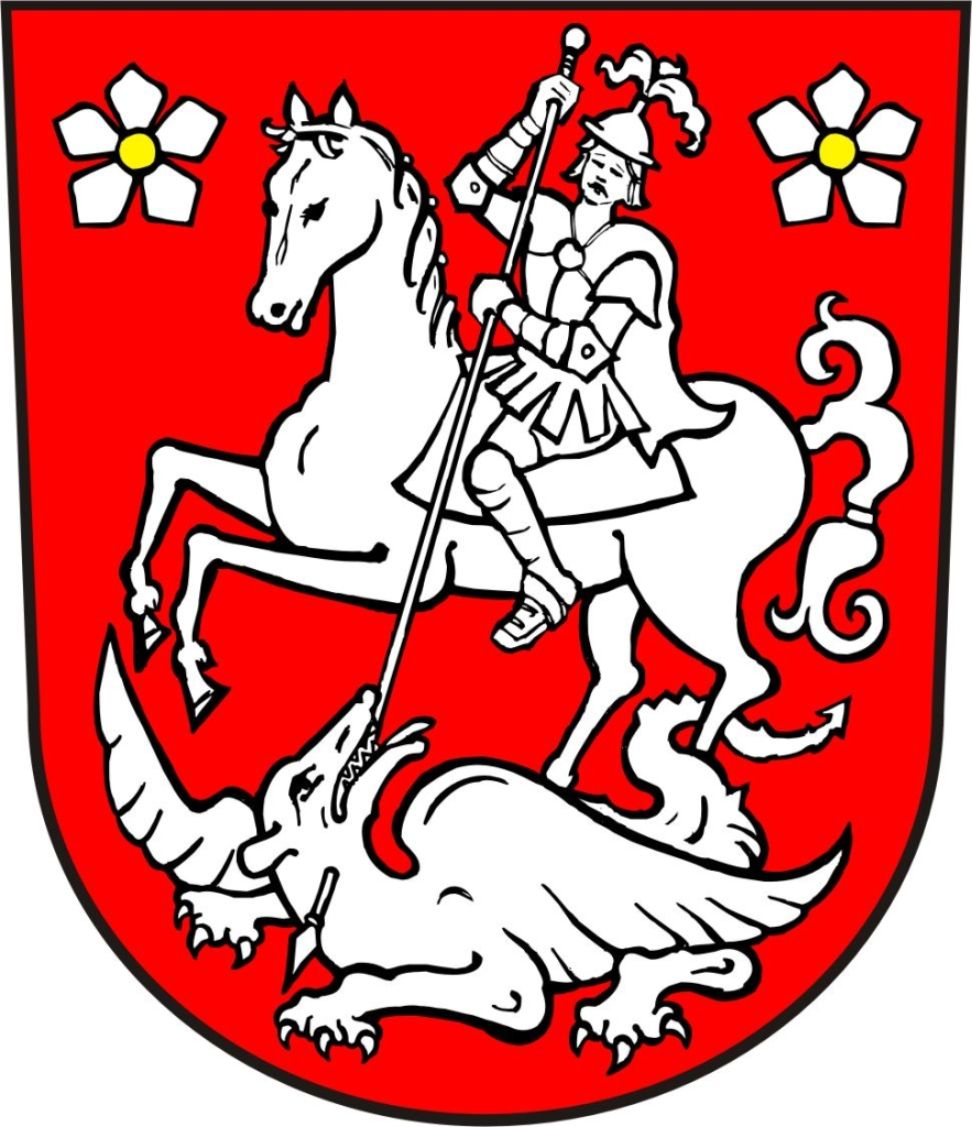 Česky: znak obce Litobratřice